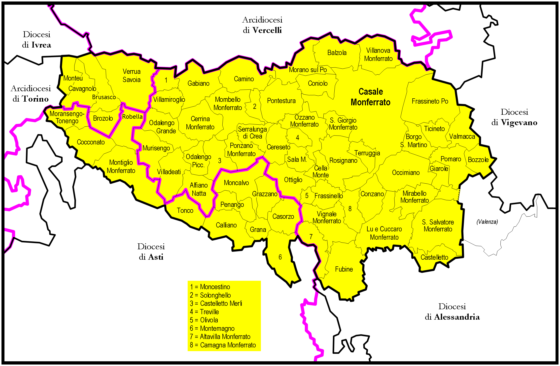 Mappa della Diocesi di Casale Monferrato (Italia)